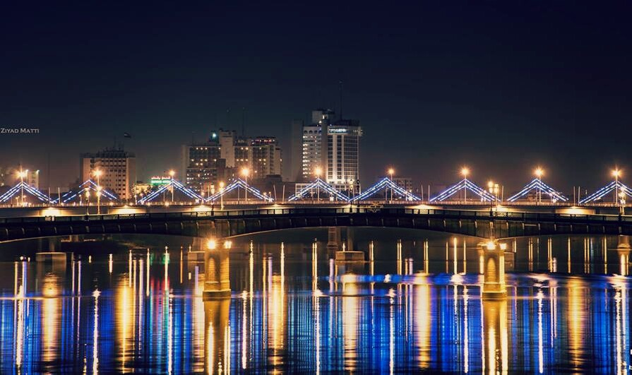 الشجرة التين والأغنام